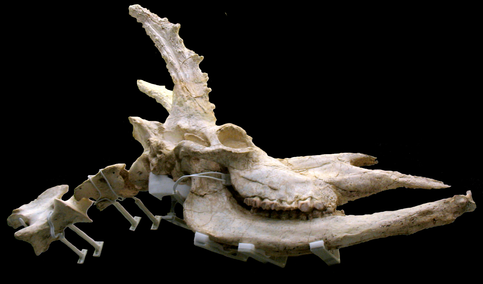 Cráneo de Decennatherium rex macho del yacimiento Batallones 10, Torrejón de Velasco, Madrid, España. Exposición temporal "La colina de los tigres dientes de sable. Los yacimientos miocenos del cerro de los Batallones (Torrejón de Velasco, Comunidad de Madrid)" en el Museo Arqueológico Regional (MAR), Alcalá de Henares (Madrid)